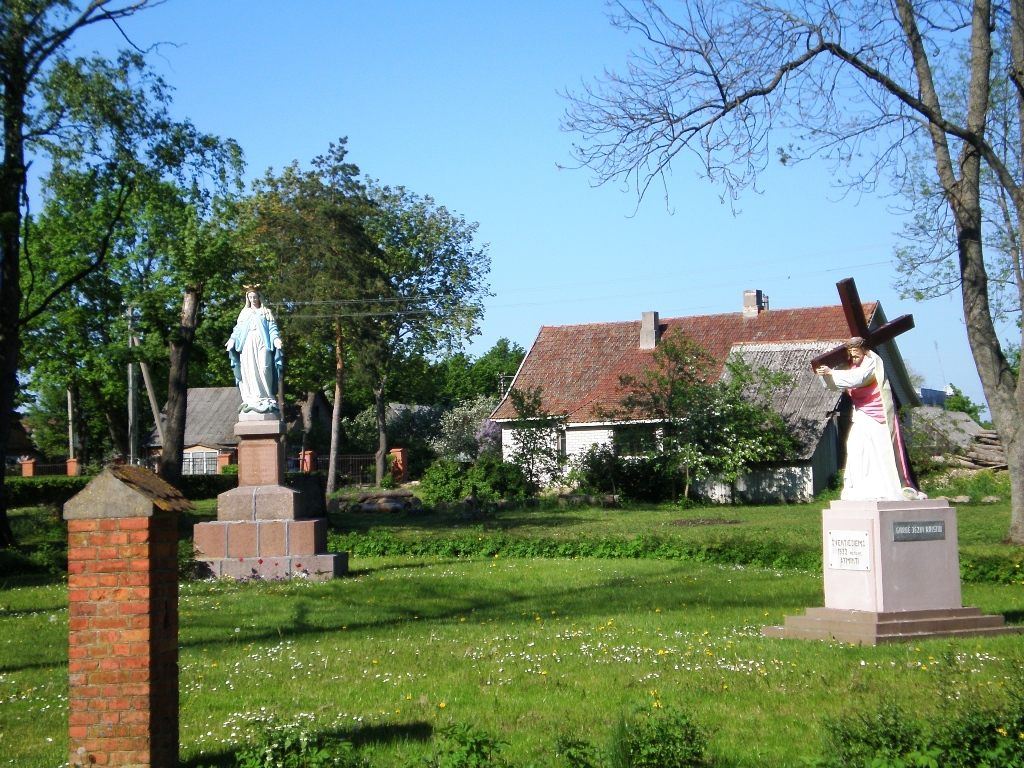 Josvainių bažnyčios šventorius 2007.05.20 foto: Hugo.arg